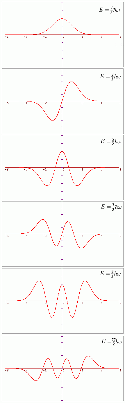 Duagram